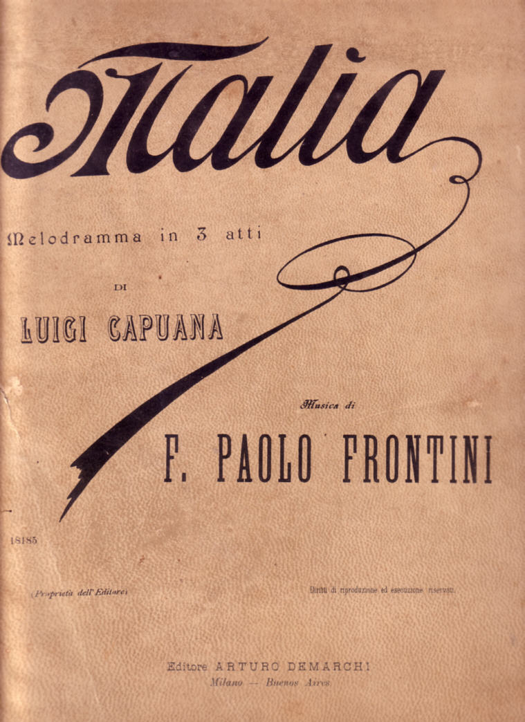 Copertina Malìa - per canto e piano, Milano, De Marchi 1893 - collezione Frontini